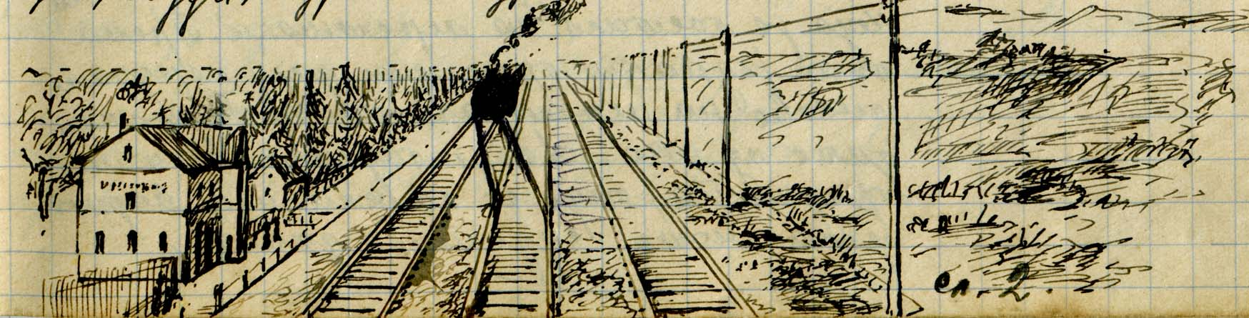 Sima Žikić, udžbenik Konspektivni pregled istorije umetnosti Železnicka stanica u Knjaževcu